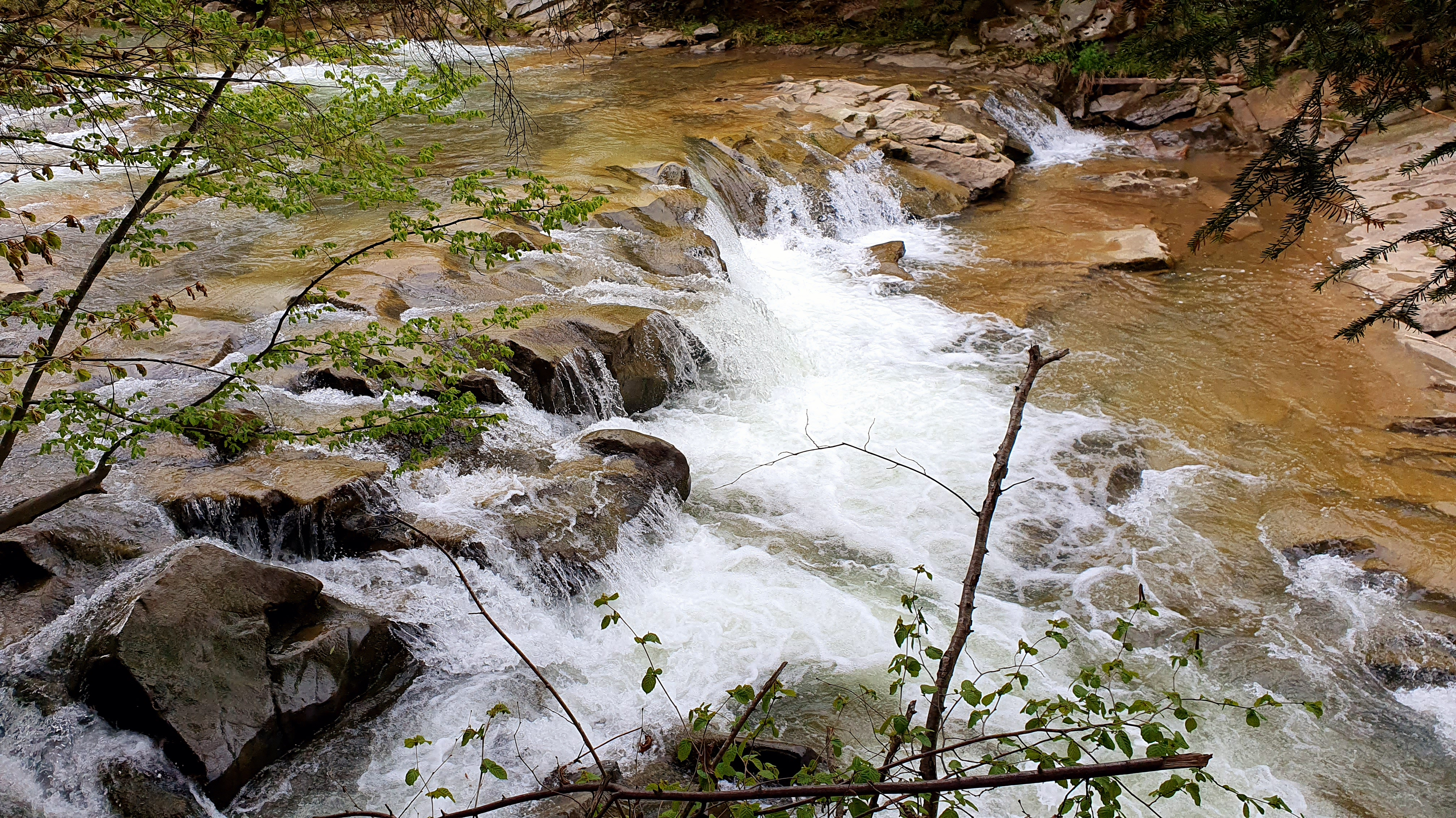 Козаківський водоспад